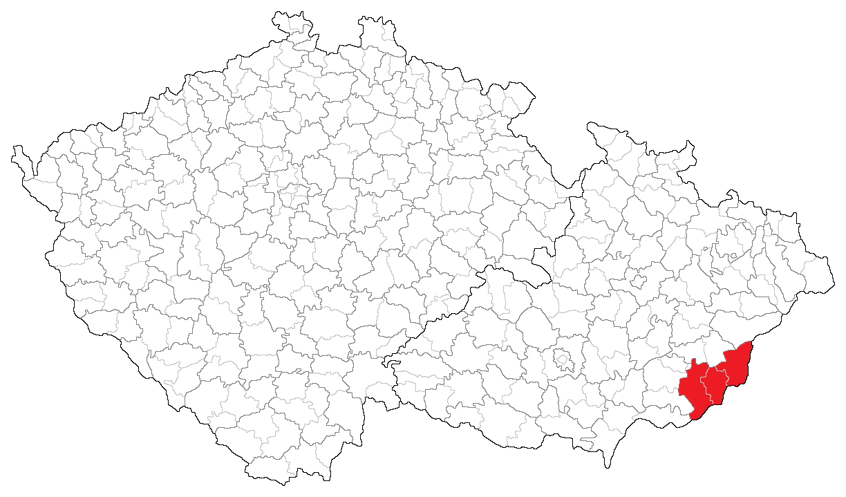 Politický okres Uherský Brod k roku 1938